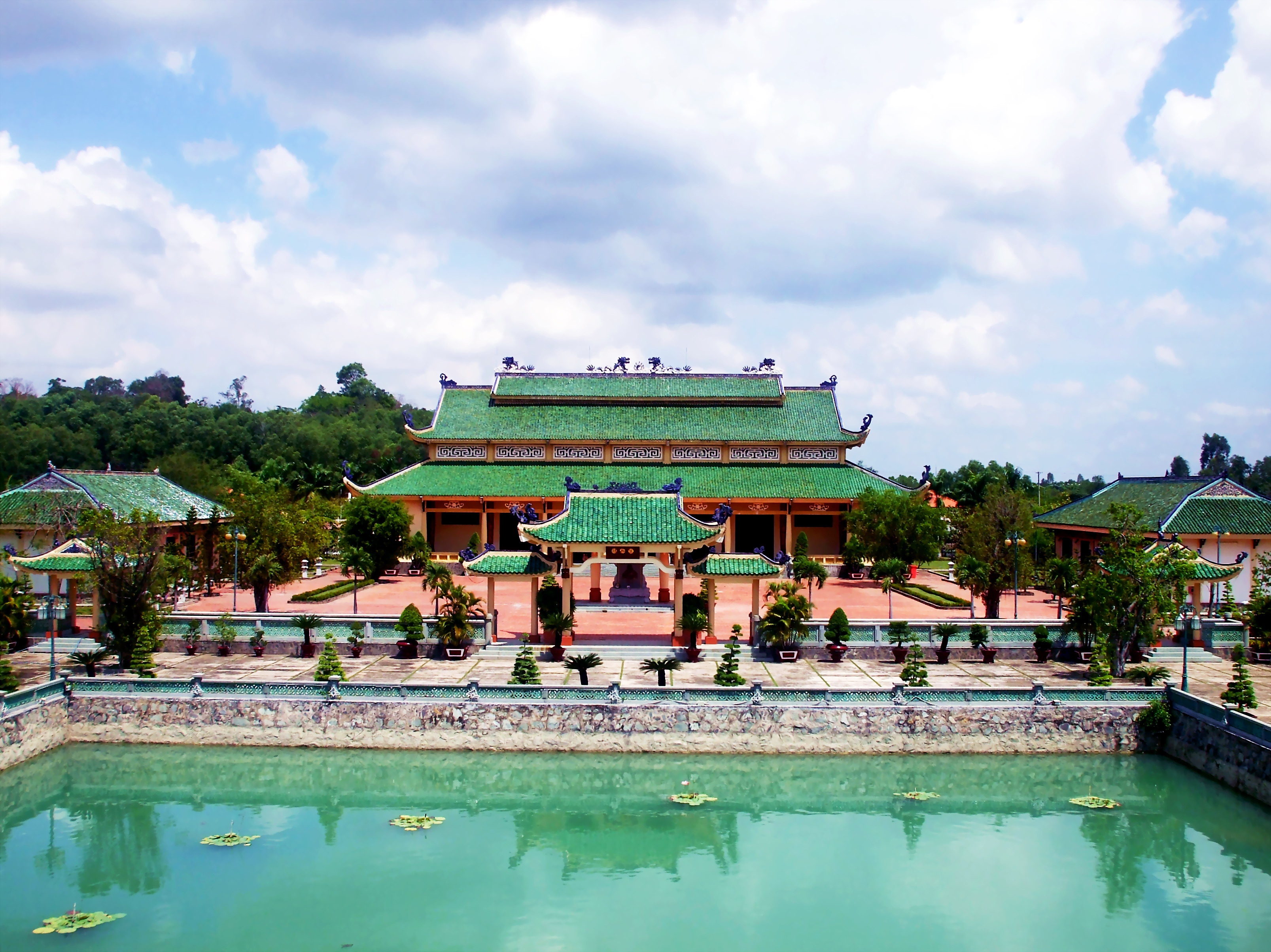 Từ hồ Tịnh Quang nhìn vào điện thờ chính trong khu Văn miếu Trấn Biên, TP. Biên Hòa, tỉnh Đồng Nai, Việt Nam.